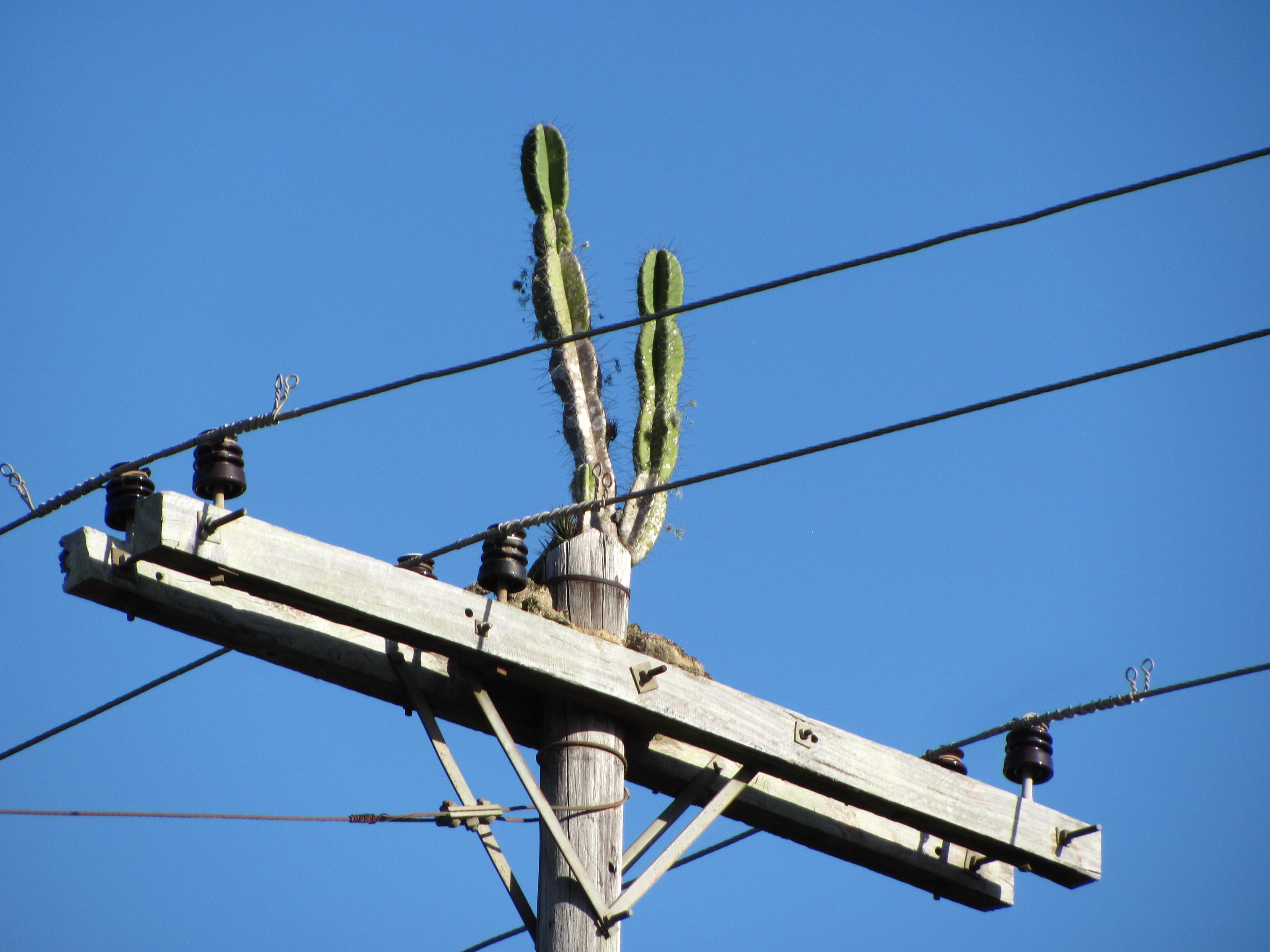 Cactus em Porto Alegre, em cima de um poste de transmissão de energia.